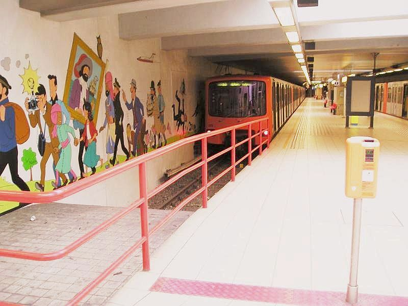 Station de métro Stockel, Bruxelles, Belgium